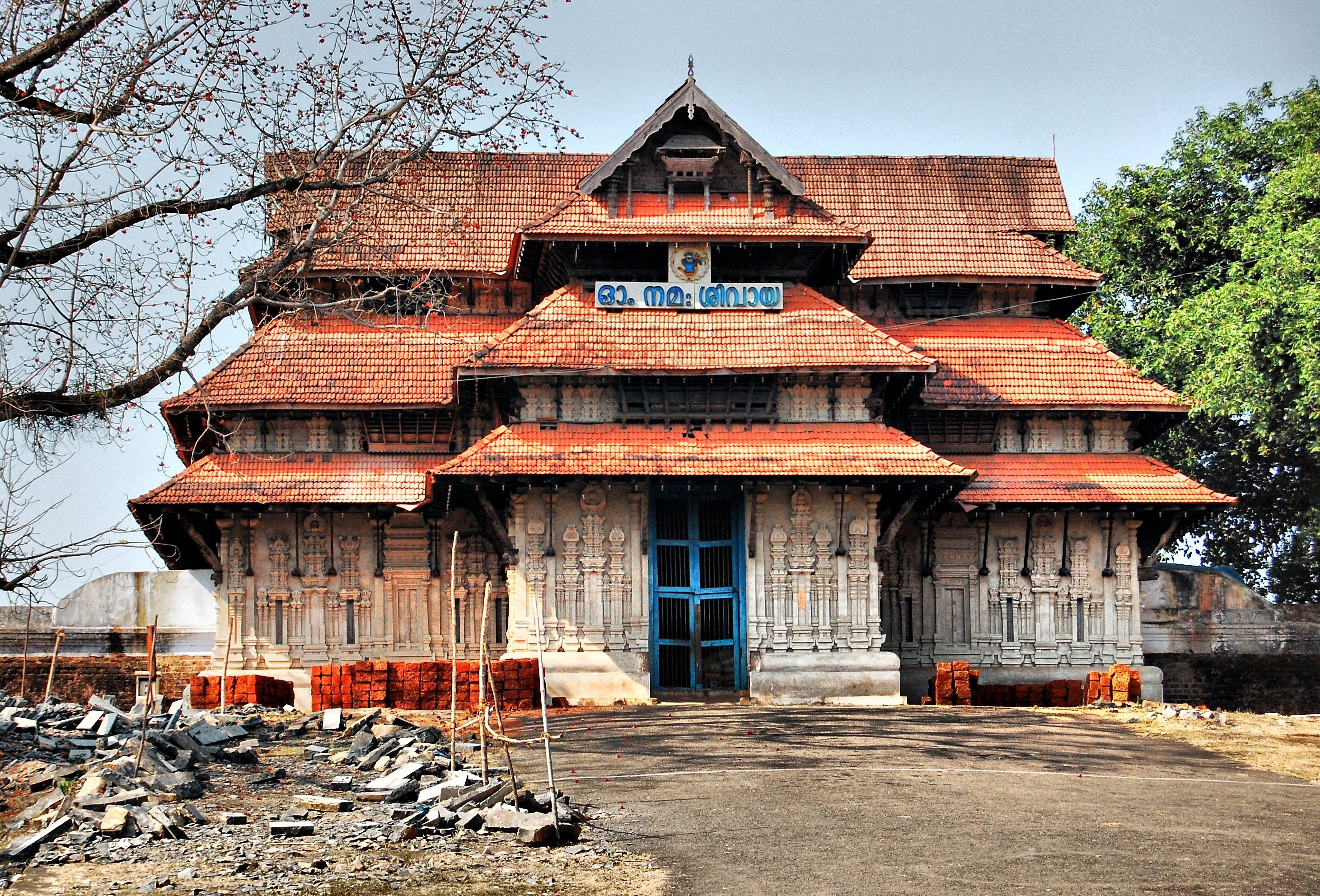 വടക്കുംനാഥക്ഷേത്രം - തെക്കേഗോപുരം